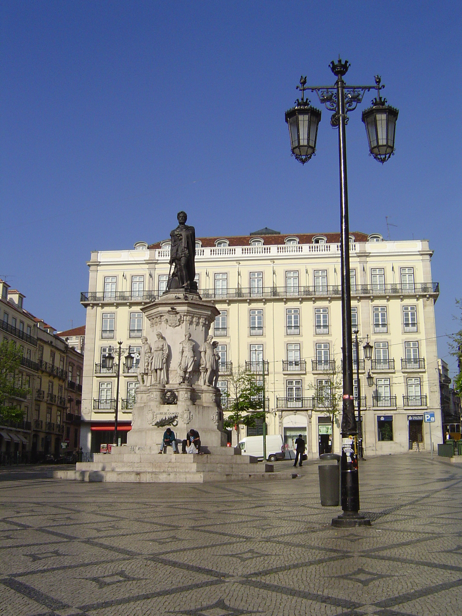 Camoens Square (Largo de Camoes) in Lisbon, Portugal